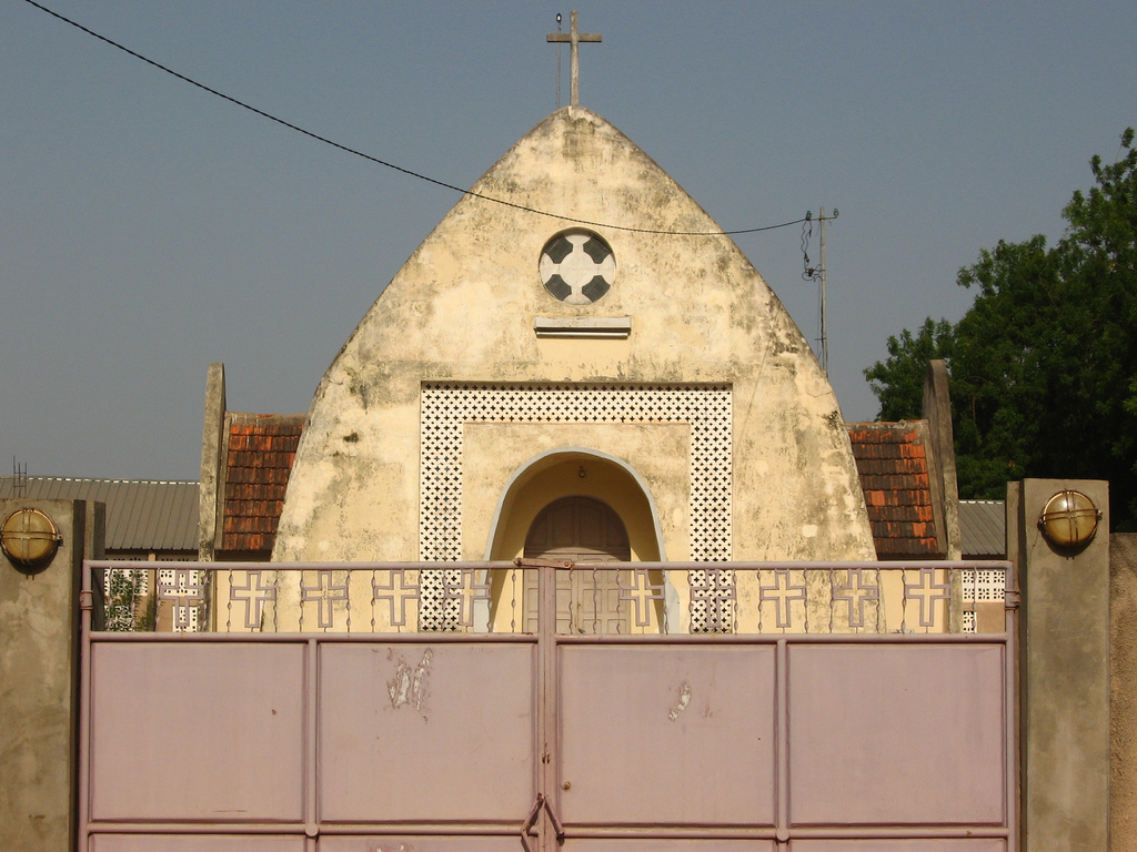 Church in Velingara